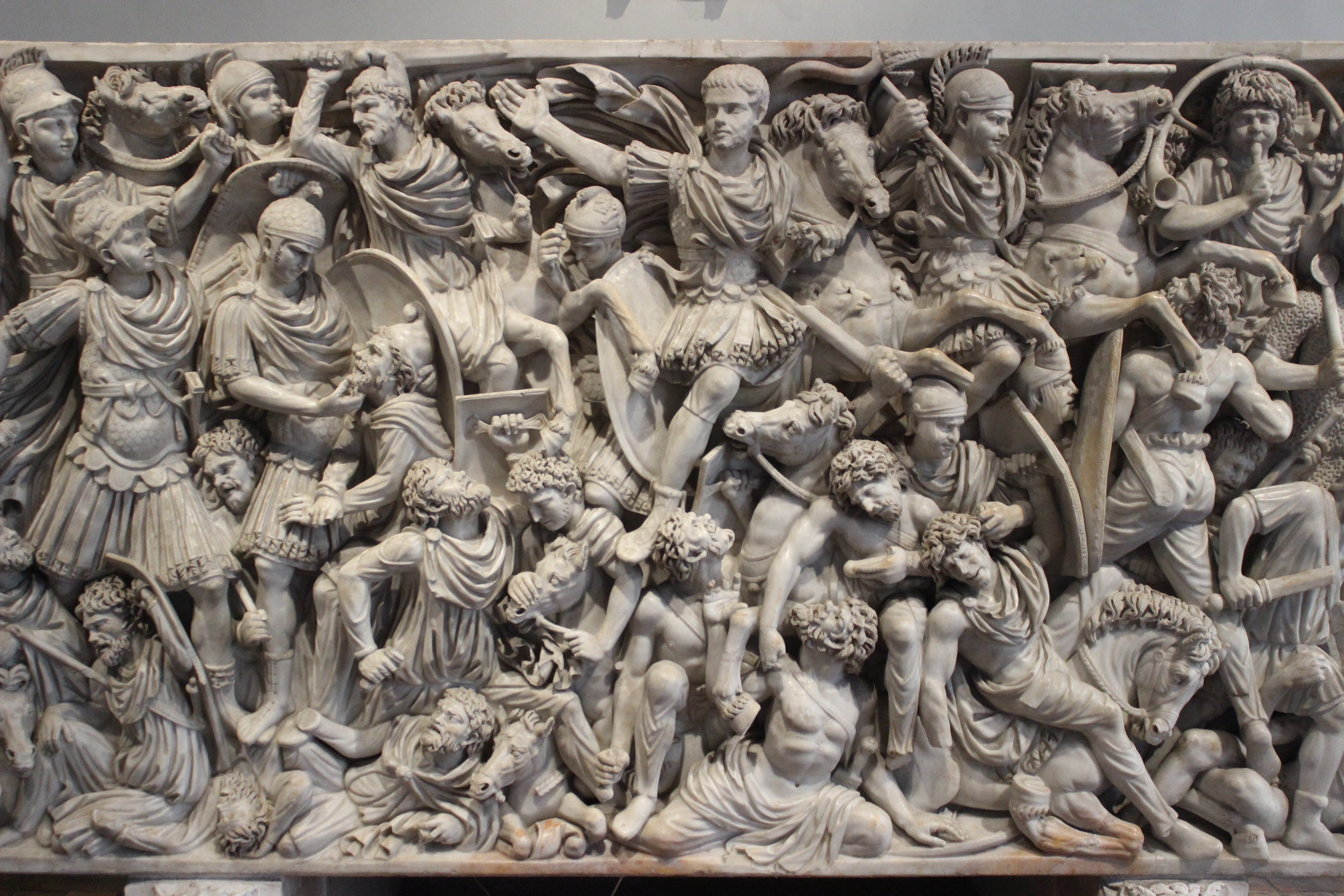 Roma. Palazzo Altemps. Gran sarcófago Ludovisi.